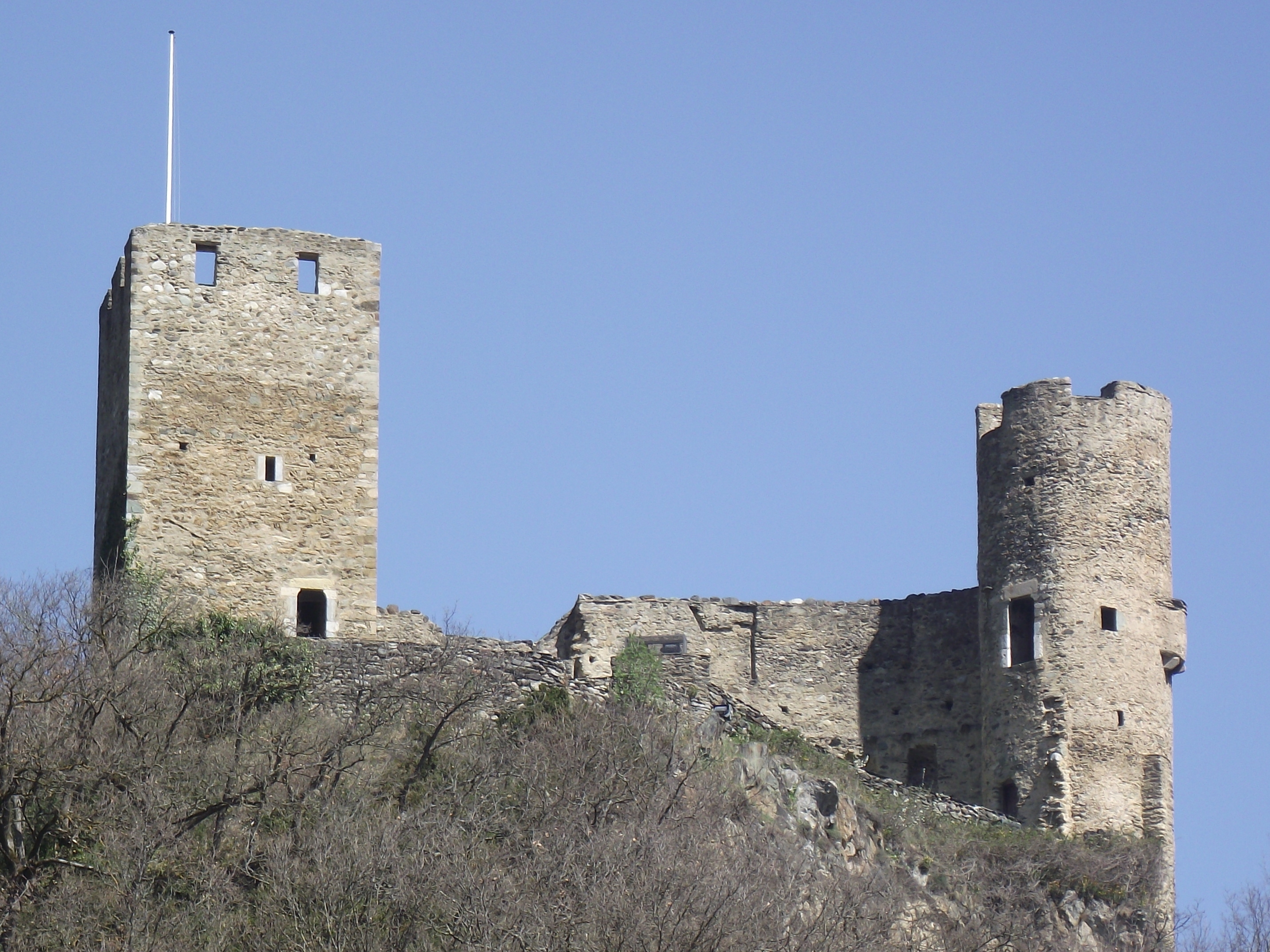 Château de Sainte-Marie (Luz-Saint-Sauveur, Hautes-Pyrénées, France)